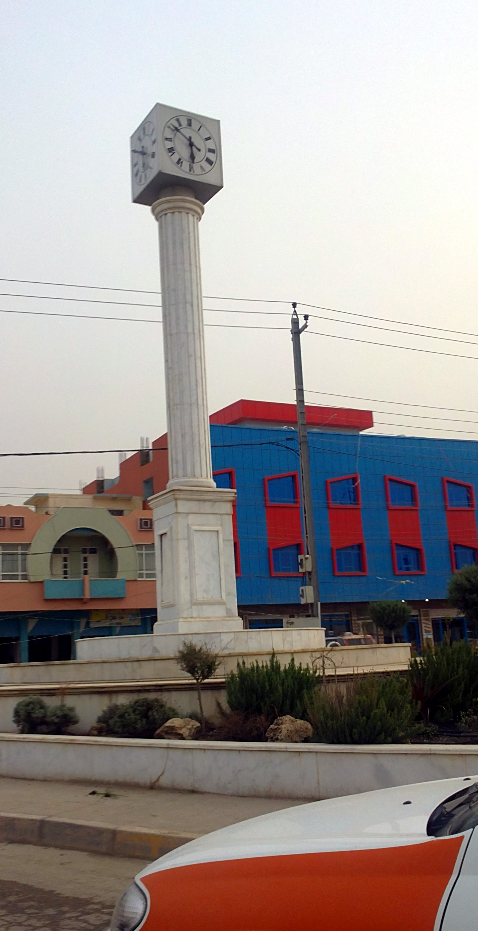 صورة لساعة زاخو